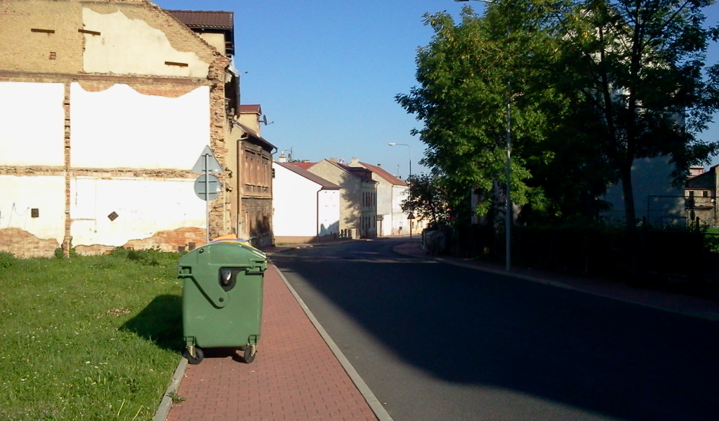 Dubí, Czech Republic